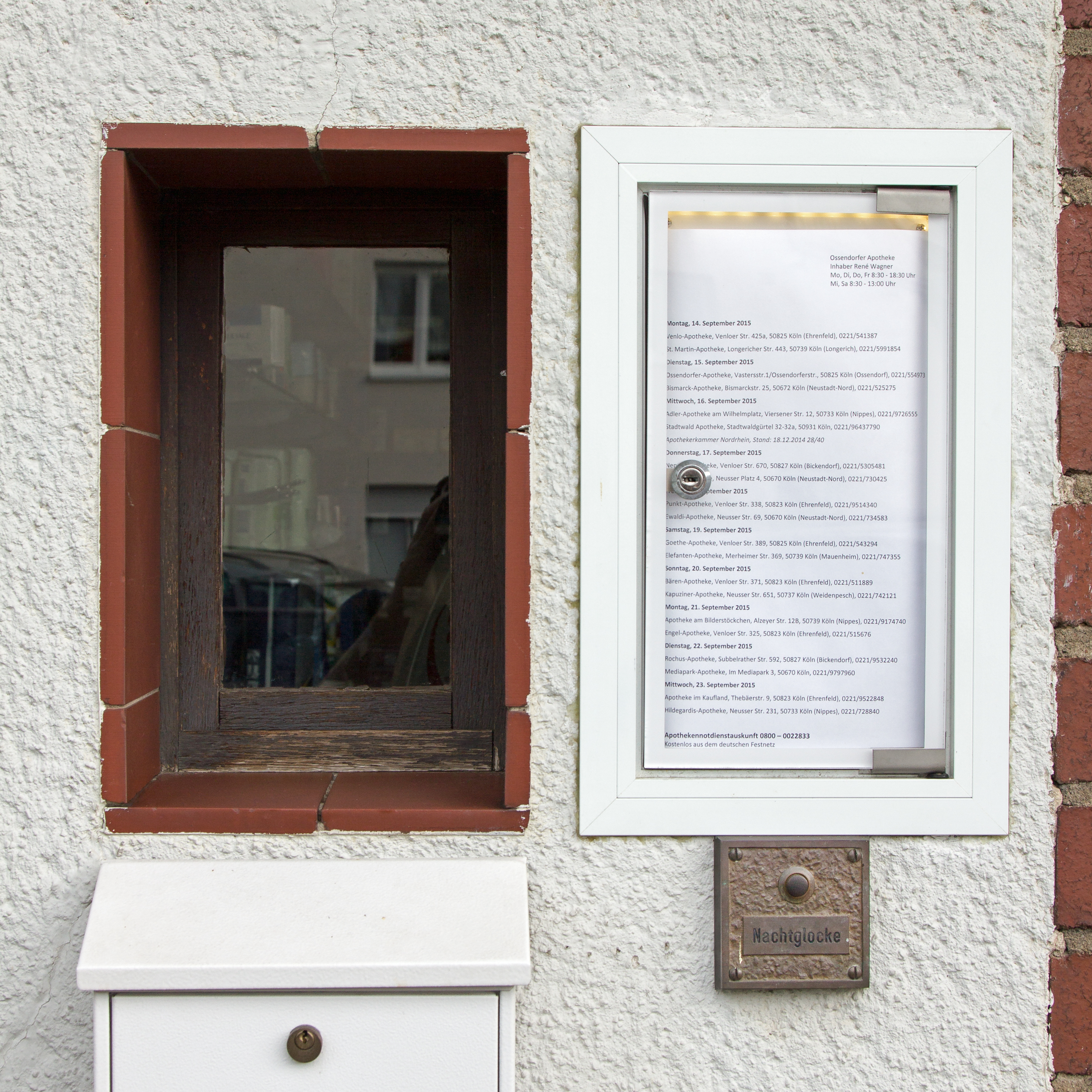 Apotheken-Notdienstfenster mit Nachtglocke und Aushang der diensthabenden Apotheken. Ossendorfer Apotheke, Köln-Neuehrenfeld